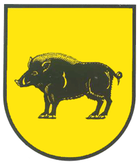 Herb miejscowości Świniuchy